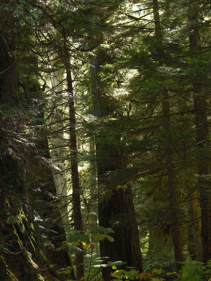 20090927.65 Canada, BC, Incomappleux Inland Rainforest